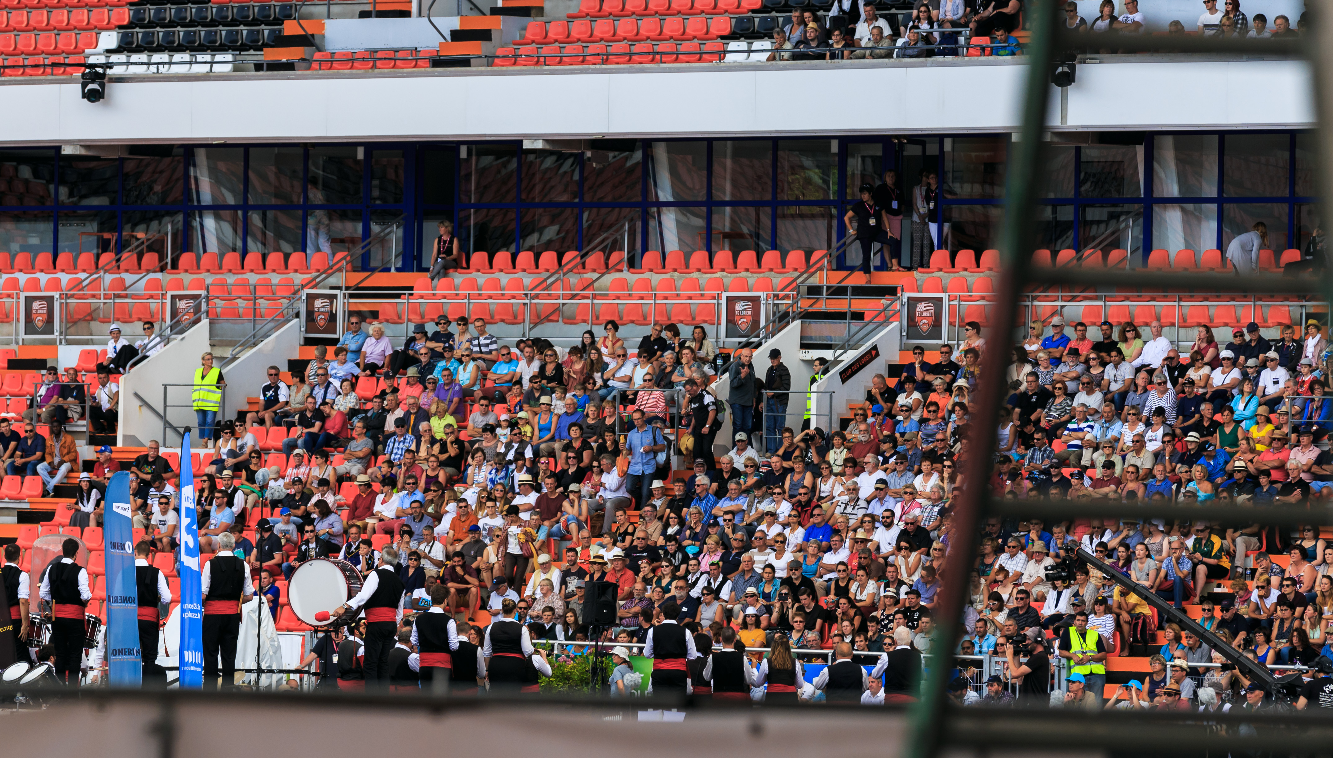 Épreuve d'été du Championnat national des bagadoù de Première catégorie organisée au stade du Moustoir dans le cadre du Festival Interceltique de Lorient en Bretagne.